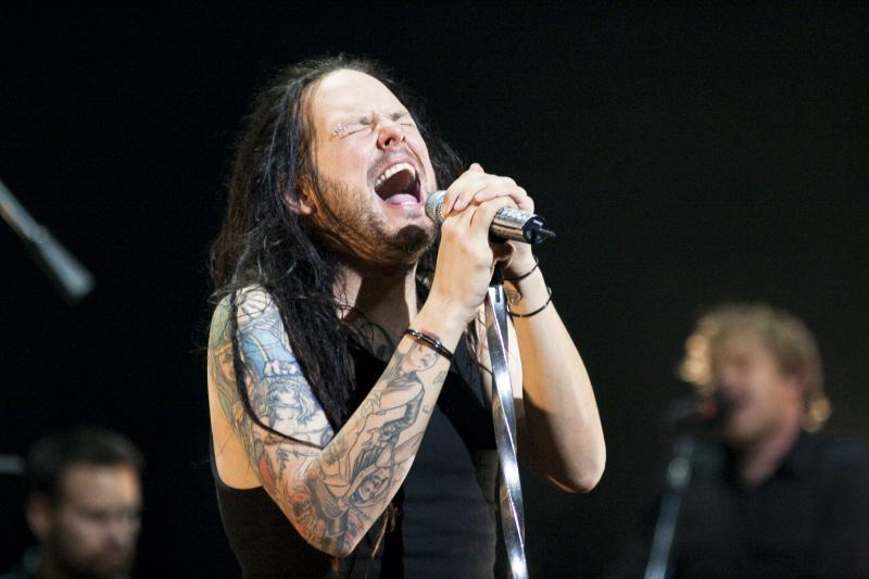 Korn Live @ Credicard Hall - 21/04/2010 - São Paulo, Brasil É proibida a cópia ou reprodução deste material sem a autorização do autor. Por favor, não publique nada daqui sem o devido crédito. Fotógrafo: Alexandre Cardoso